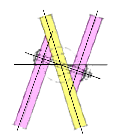 Knoten in der Zollbauweise mit außermittigen Quermoment